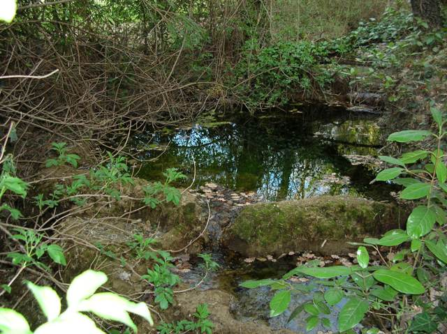 cours d'eau du Prignon